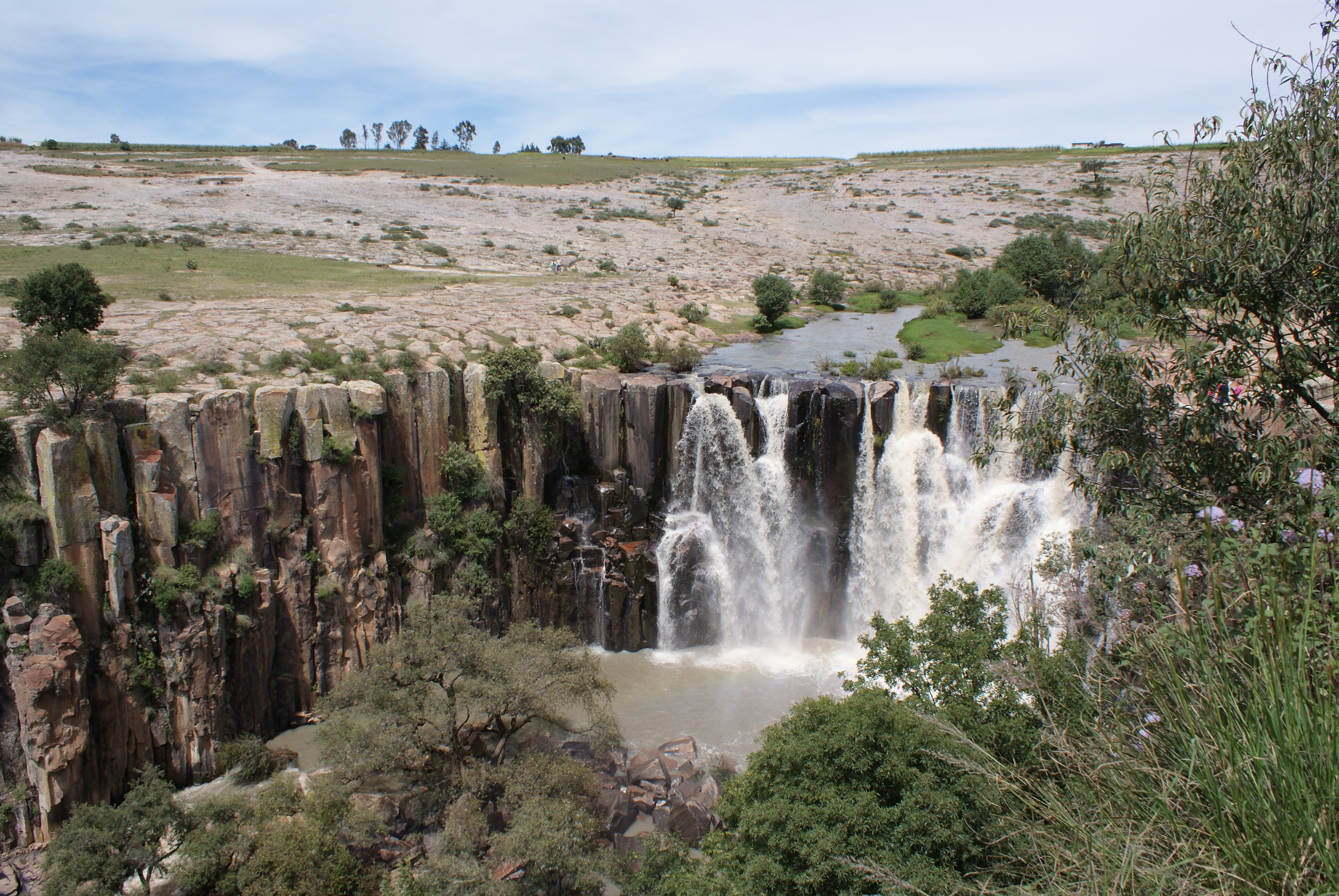 Cascada